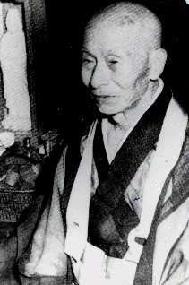 Daiun Harada Roshi